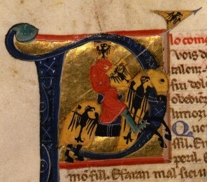 Guillaume IX d'Aquitaine